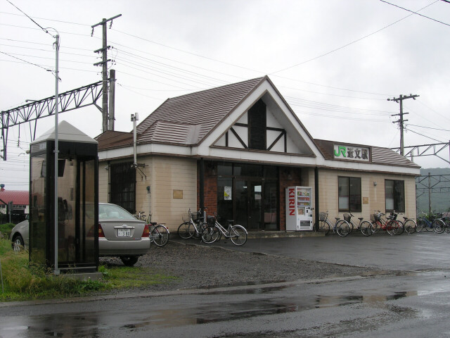 駅舎（雨天時） 撮影日 2004年6月30日 撮影場所 近文駅駅前広場 撮影者 投稿者と同じ（Mr-haruka）